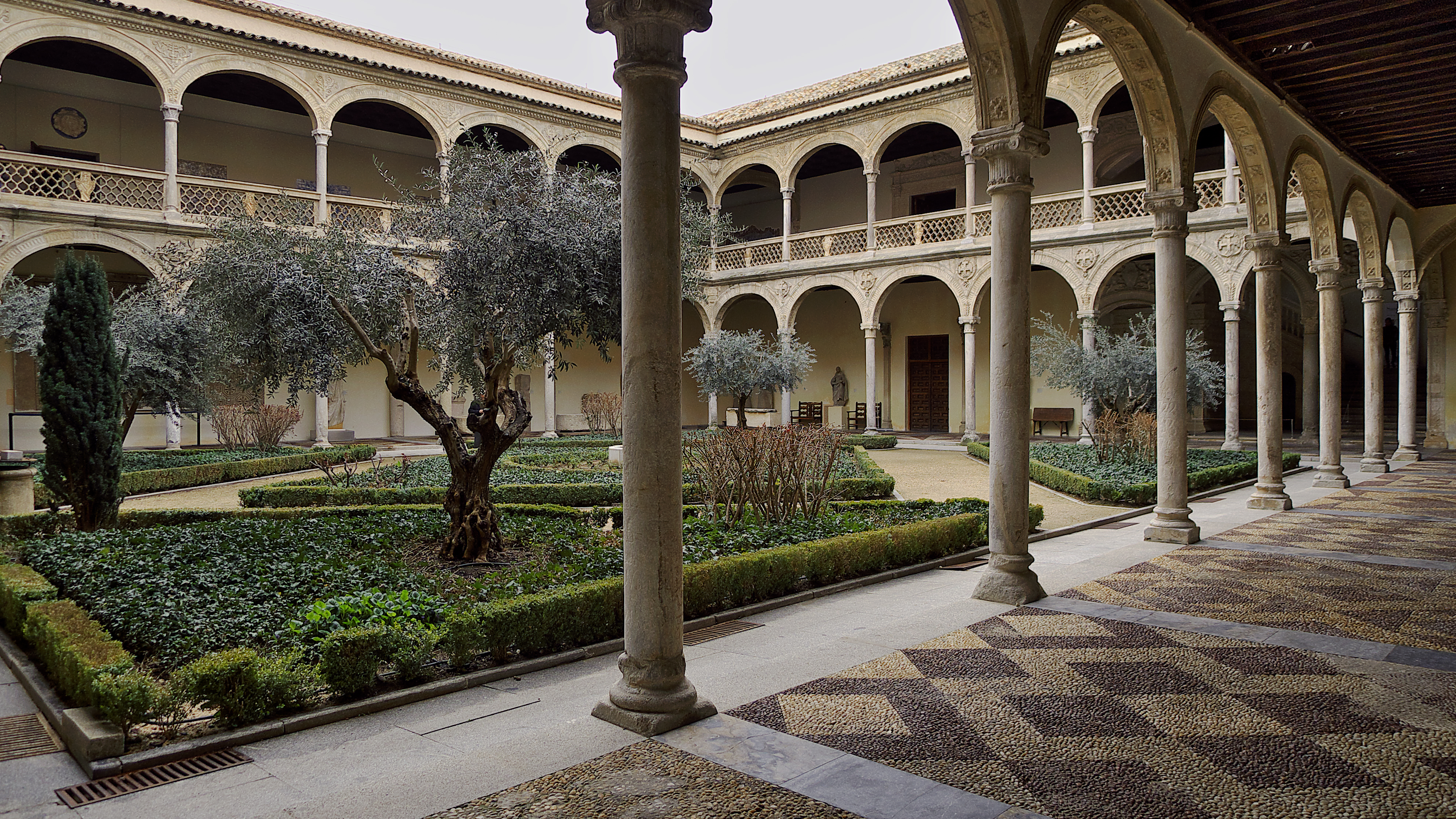 Alonso de Covarrubias aporta a las trazas de Enrique Egas (1504) este patio, significativo del arte renacentista (1517-1524)